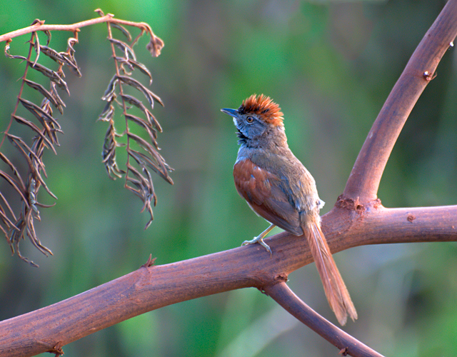 Piraju-SP - Brasil